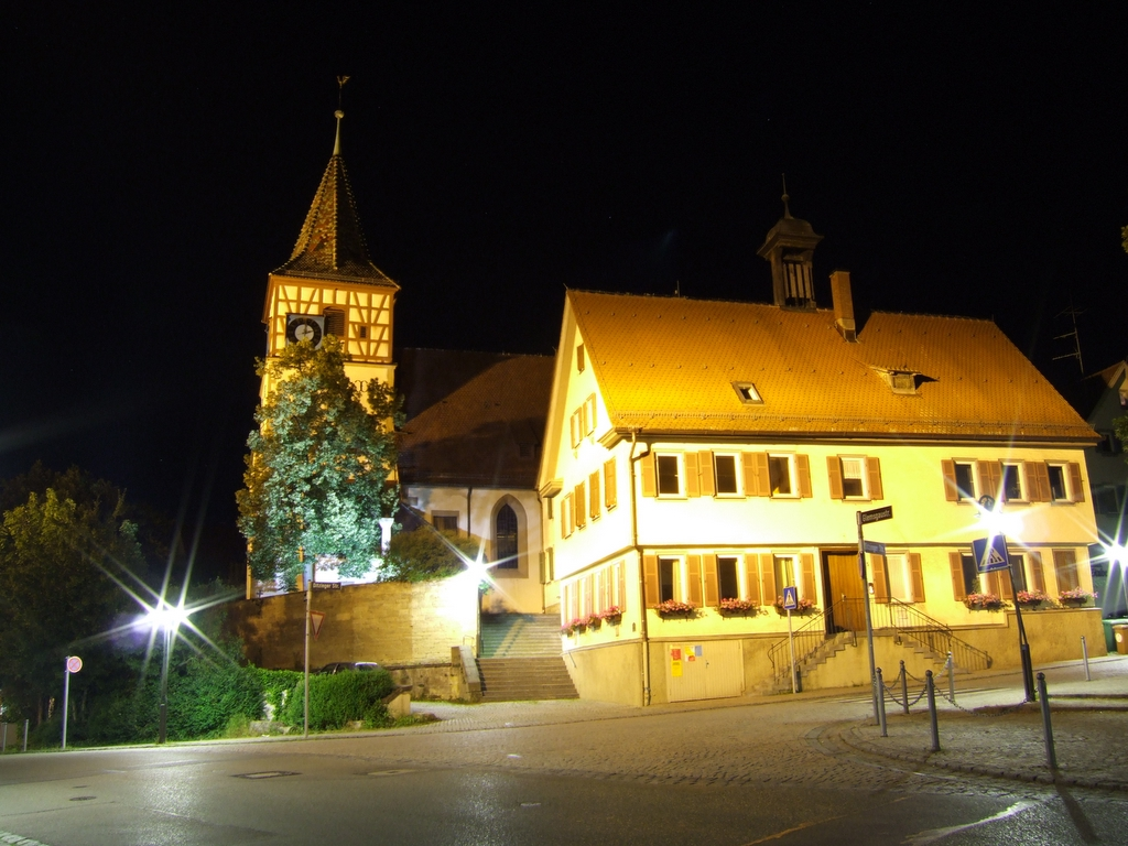 Die Photographie zeigt die Oswaldkirche mit dem Alten Rathaus in Weilimdorf (Stadtkreis Stuttgart) bei Nacht. Aufgenommen von MBL im Juli 2006 -selbst aufgenommen- Bitte nur mit Quellenangabe (Autor) benutzen.